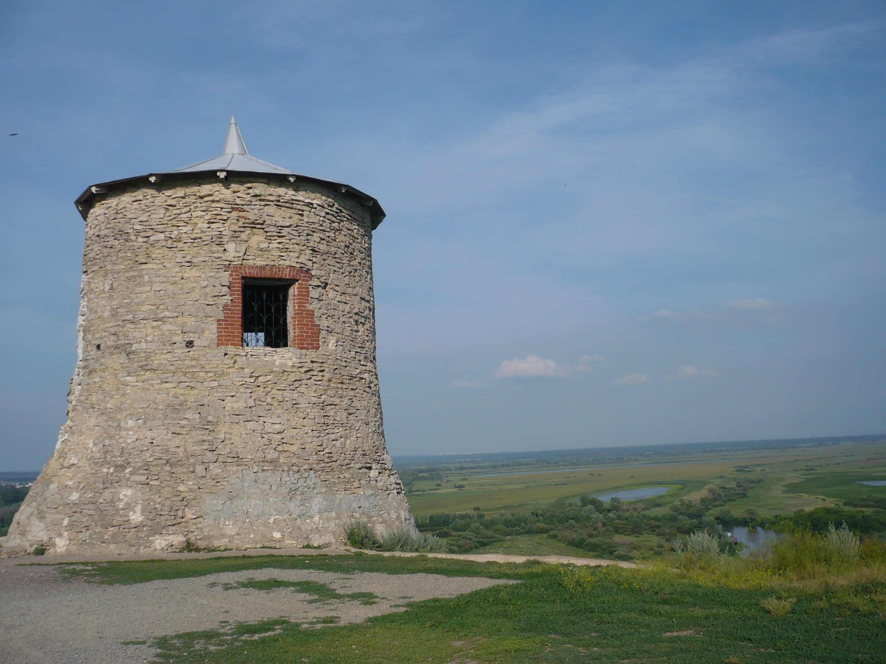 Елабужский государственный историко-архитектурный и художественный музей-заповедник (Республика Татарстан, Нижнекамск, город Елабуга)